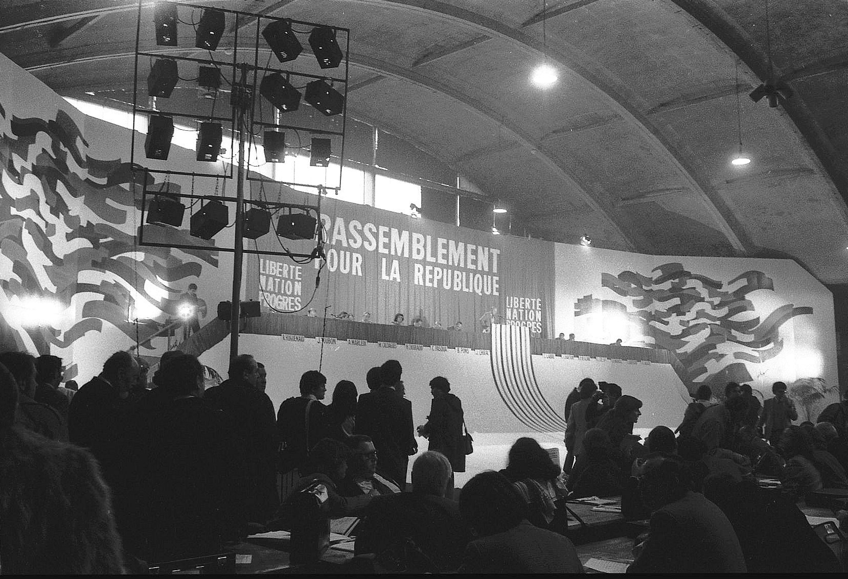 Parc des Exposition à Toulouse. 24 Janvier 1982. Vue de la salle du parc des Expositions pour les assises du RPR.